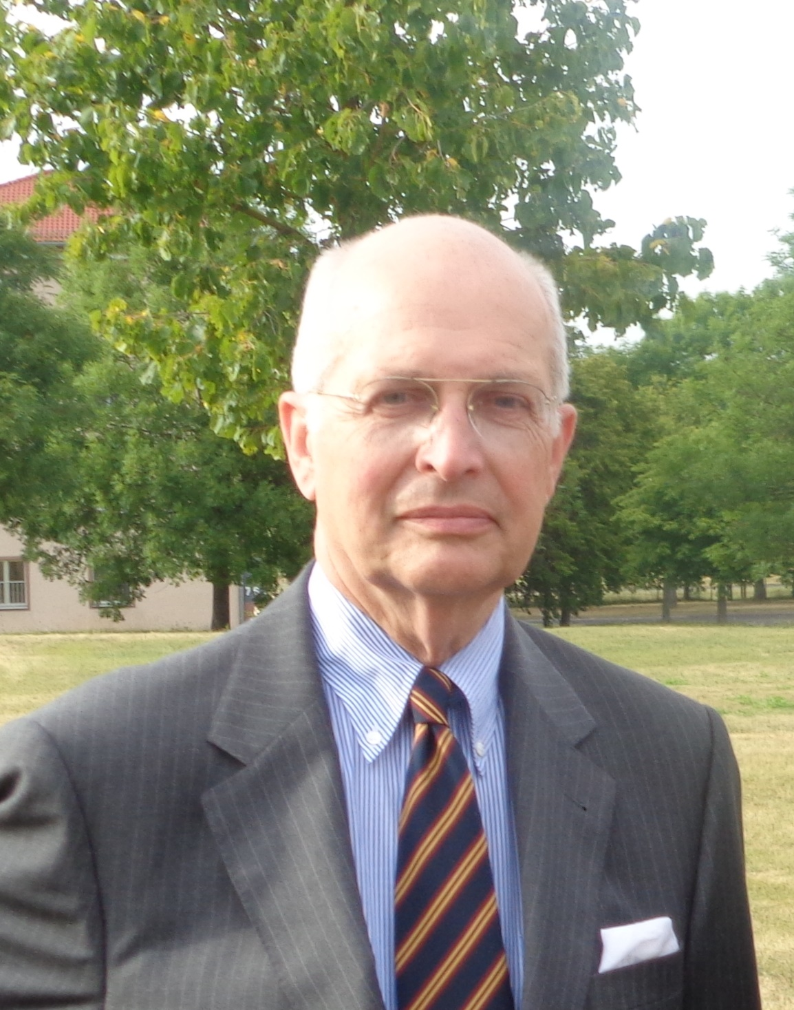 Porträtfotografie von Dr. Karsten Bahnson